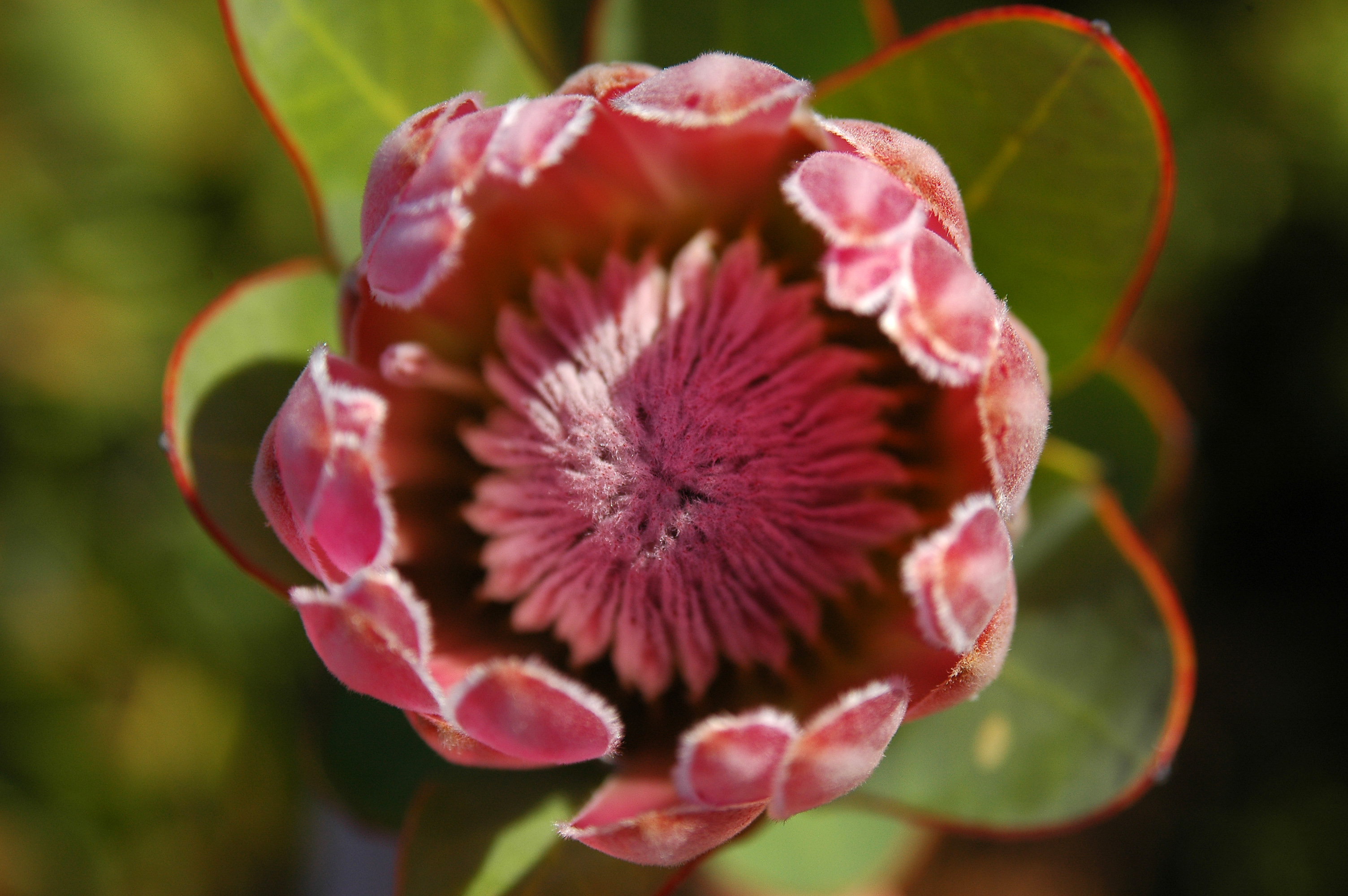 Protea compacta, fotografiert in Südafrika